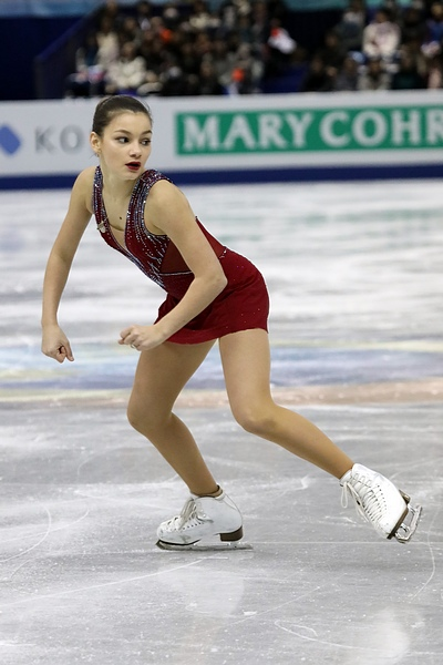 Софья Самодурова (Россия) на финале юниорского Гран-при 2017-2018